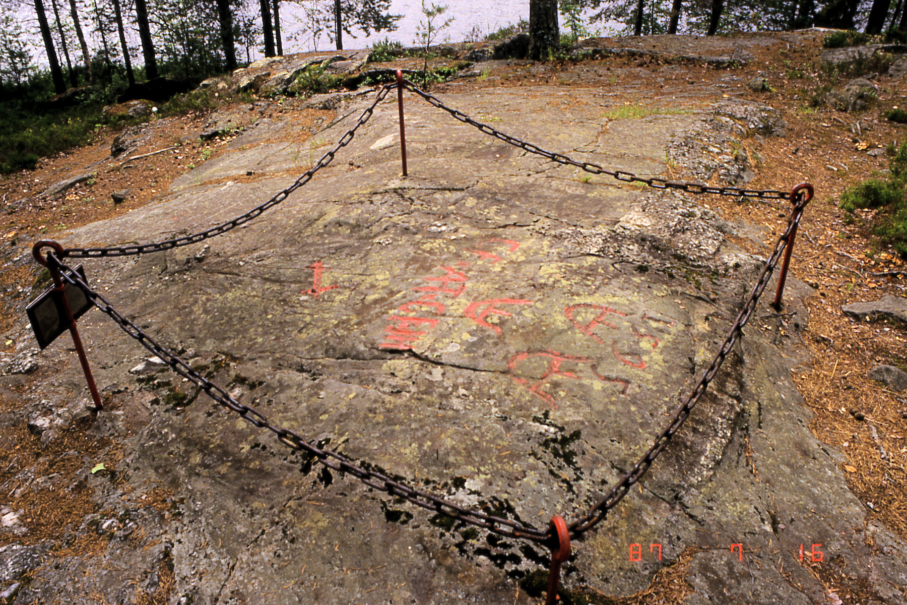 Täyssinän rauhan rajamerkki Ohtaansalmella